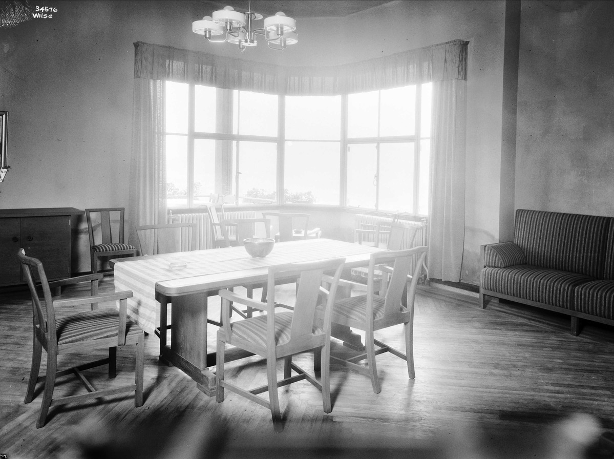 Ekebergrestauranten, interiør 1929